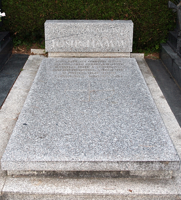 grob Josipa Hamma na Mirogoju u Zagrebu